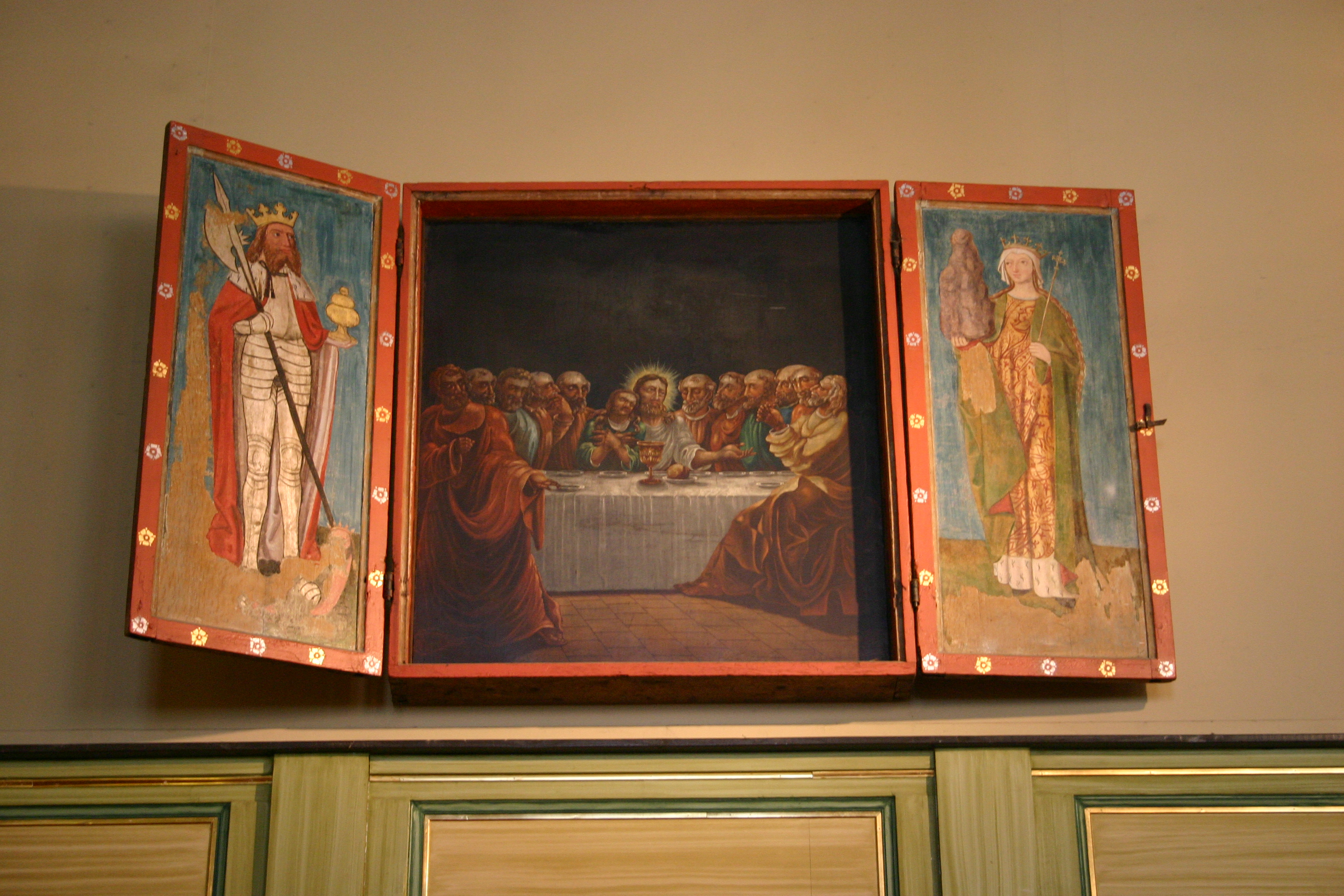 Alterskap i Fjell kirke.